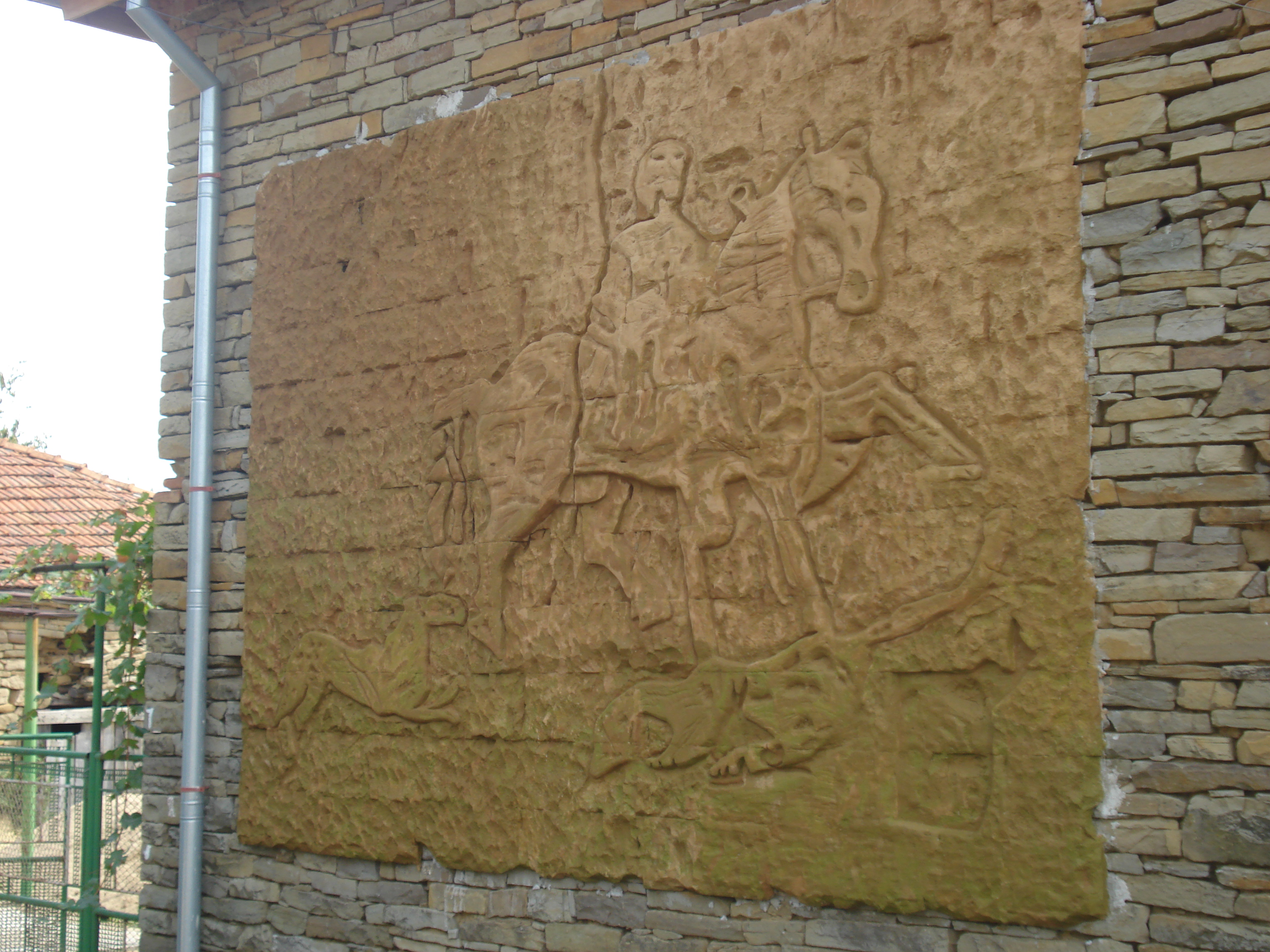 Мадарският конник "пристигна" в с.Дъбовица като идея на група млади хора от гр.Ямбол.Това творение предизвика интерес у местното население и туристите.Сега хората от селото символично наричат улицата "Мадарски конник".